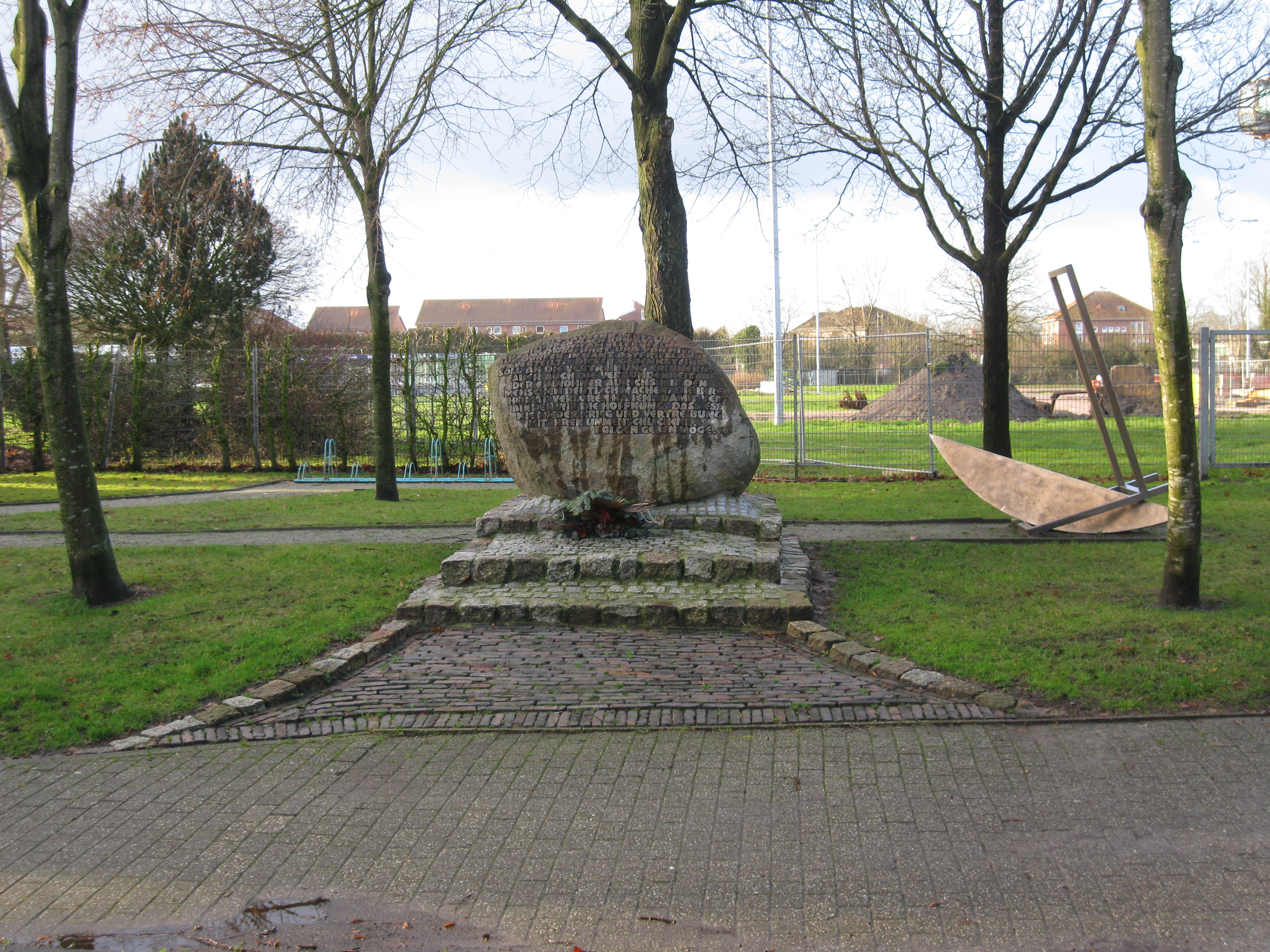 Gedenkstein für die Vertriebenen an dem alten Sammelplatz am Ellernfeld, errichtet 2011